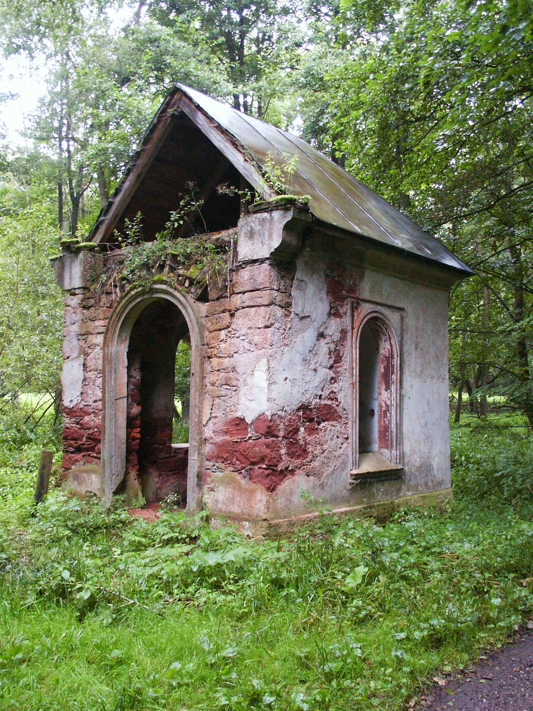 Bystřice - kaple Navštívení Panny Marie z roku 1829